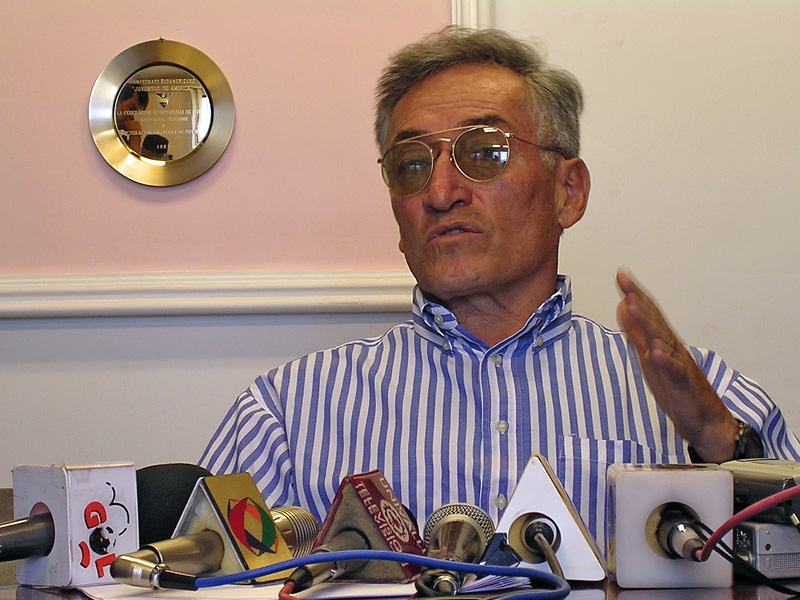 Ramiro Blacut, Siège de la FBF - Fédération Bolivienne de Football, Cochabamba, le 16 avril 2004, lors de sa présentation à la presse en tant que nouveau sélectionneur de l'équipe nationale de football Bolivienne.